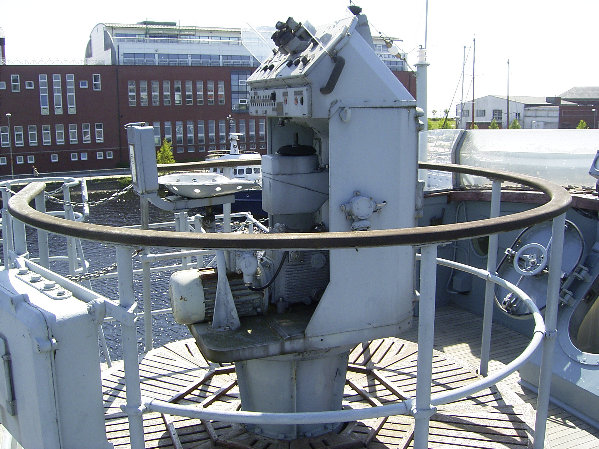 Artillerieleitstand der 4 cm Bofors-Flak des Minensuchbootes "Weilheim". Aufgenommen im Marinemuseum Wilhelmshaven.